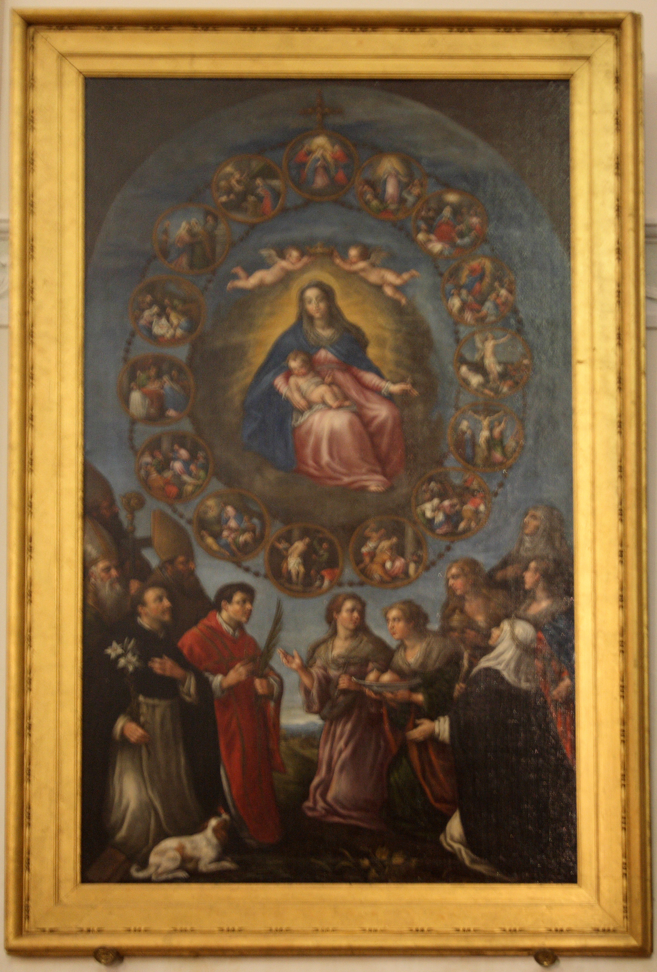 Scuola di Jacopo Da Ponte - 1629 circa